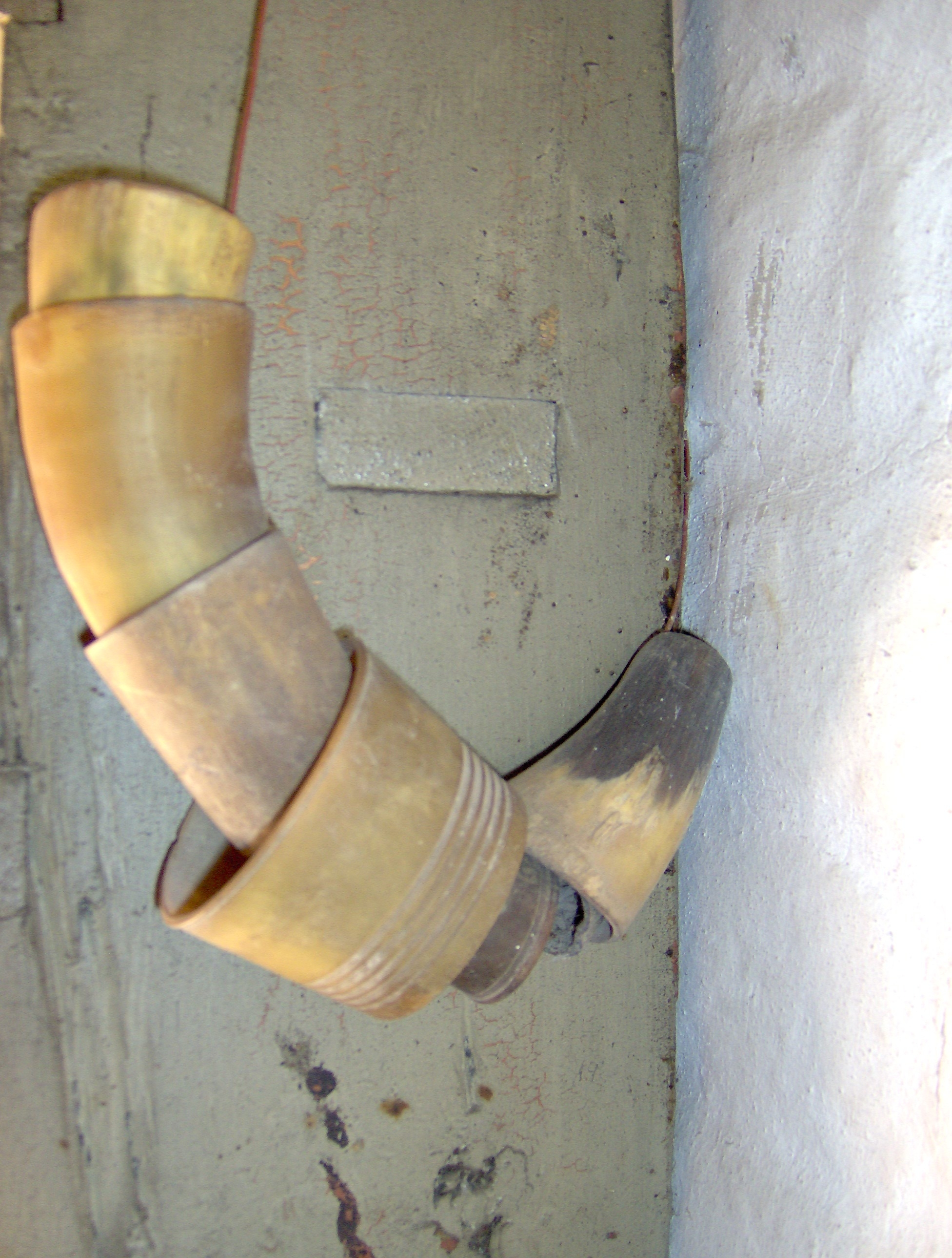 Fotograferet på Frilandsmuseet ved København